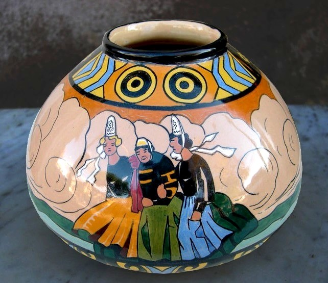 Vase par Jim Sevellec, Henriot, Quimper, France, XXe siècle